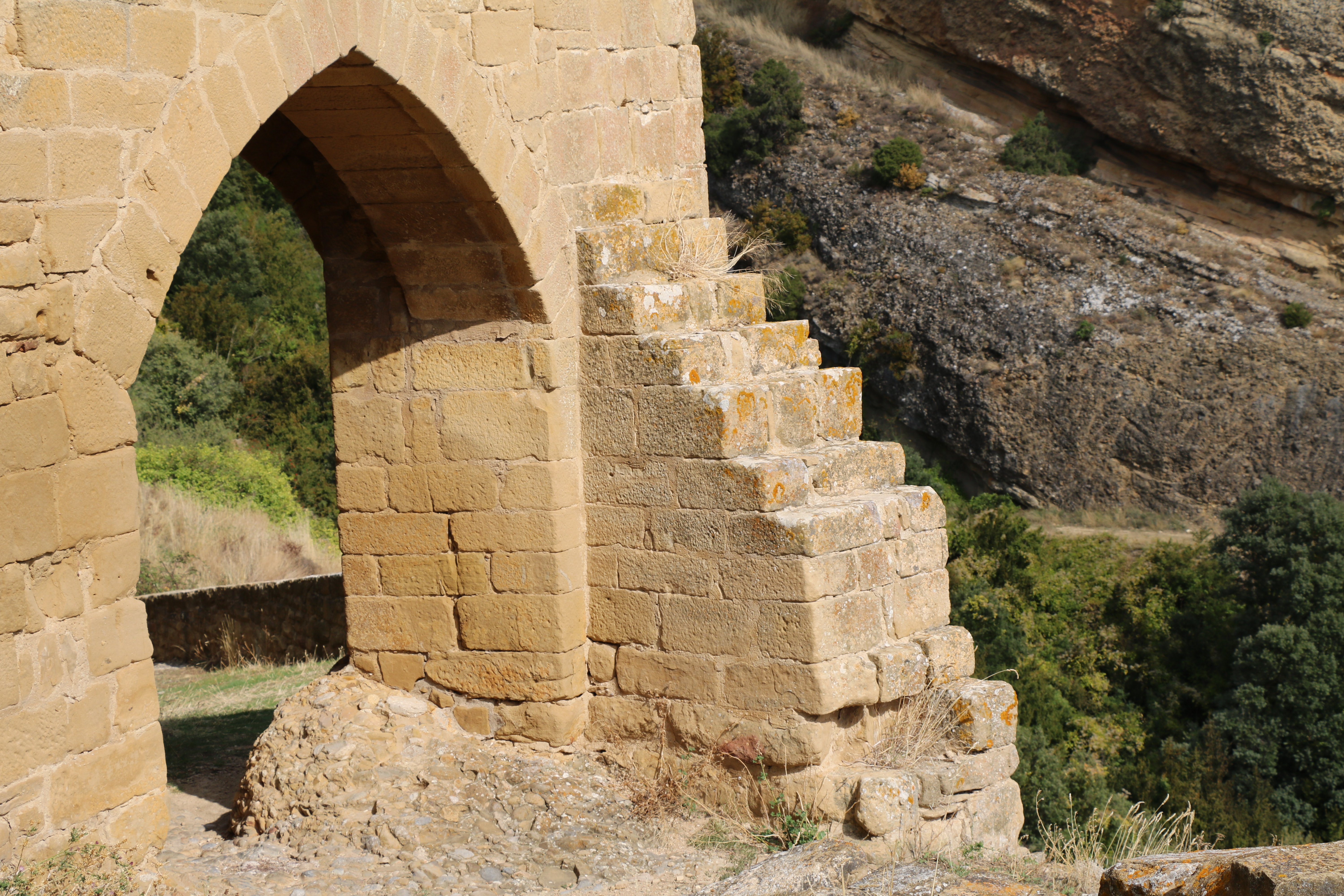 Vista de la arquería junto a la iglesia parroquial de San Martín